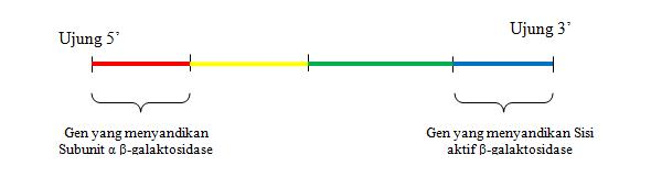 lacZ, gen yang menyandikan beta-galaktosidase.